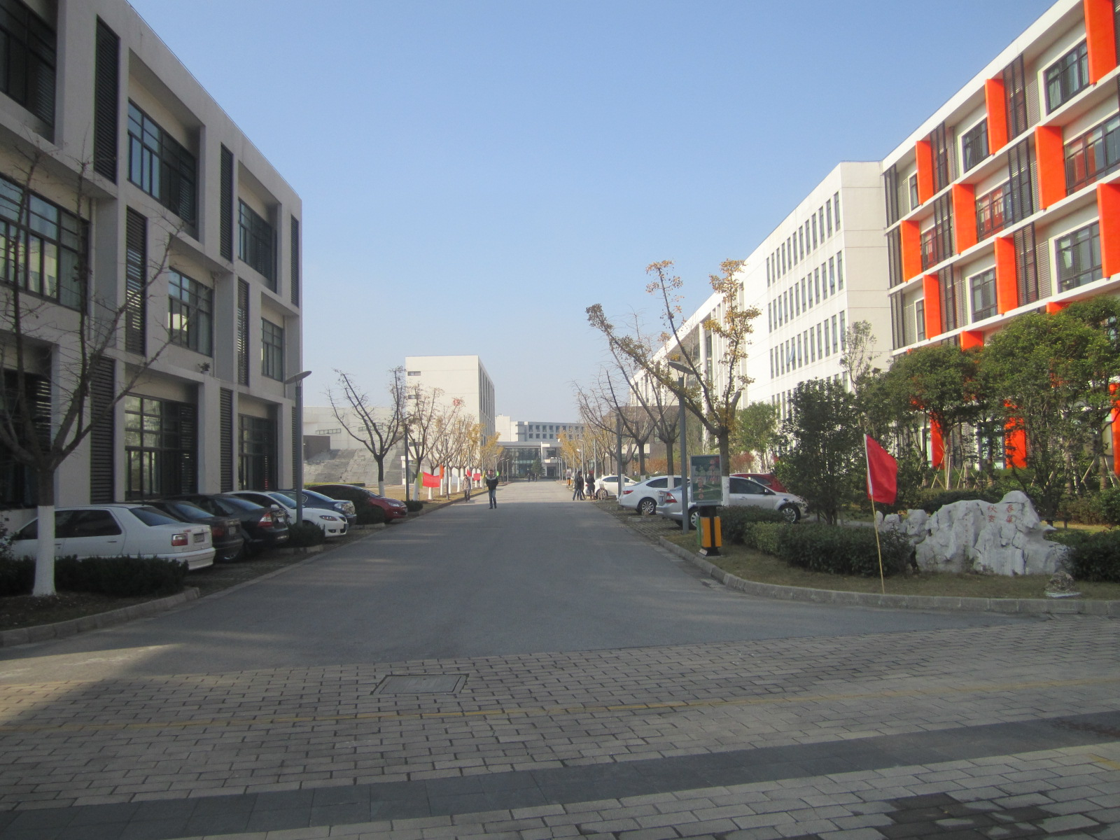 蘇州高新区住宅区の風景